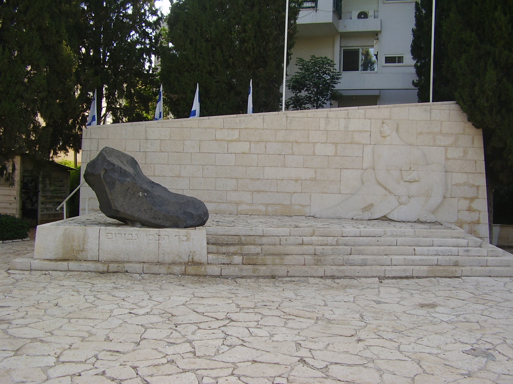 Relife